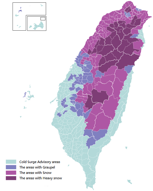 Snowfall areas in Taiwan